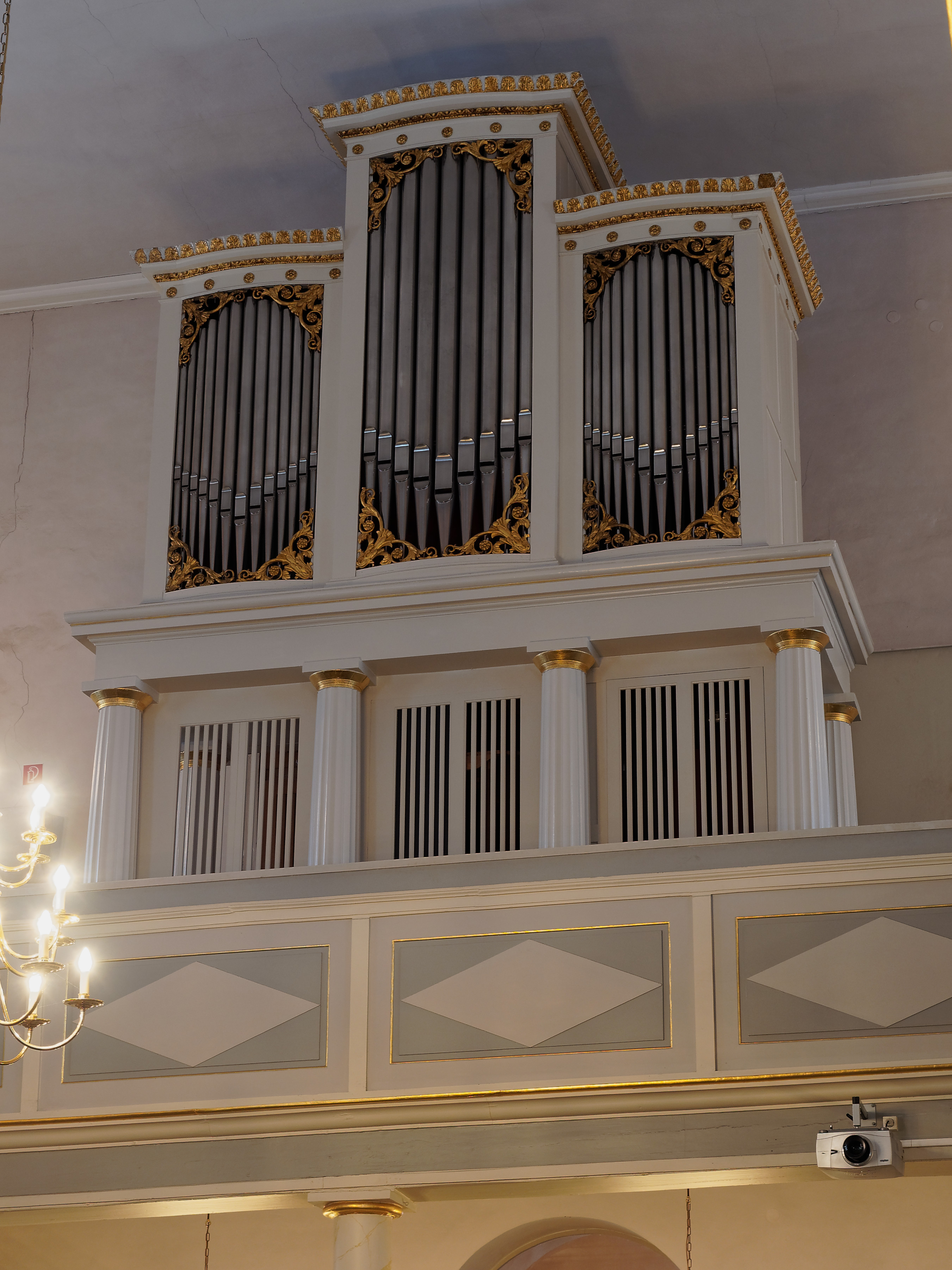 Margarethenkirche in Kierspe, Orgel, fotografiert anlässlich des Wikipediastammtisches Sauerland in Kierspe